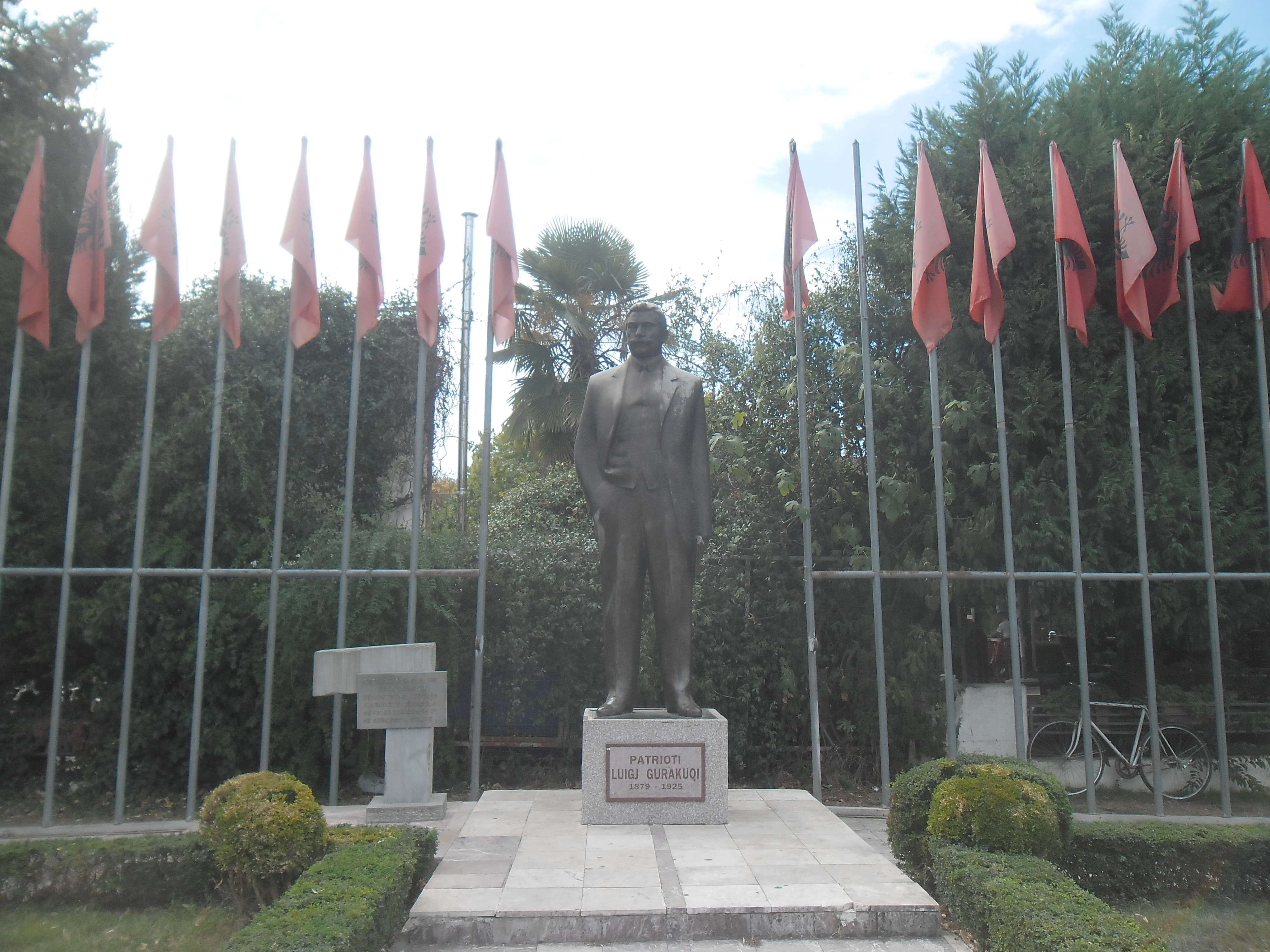 Shkodër